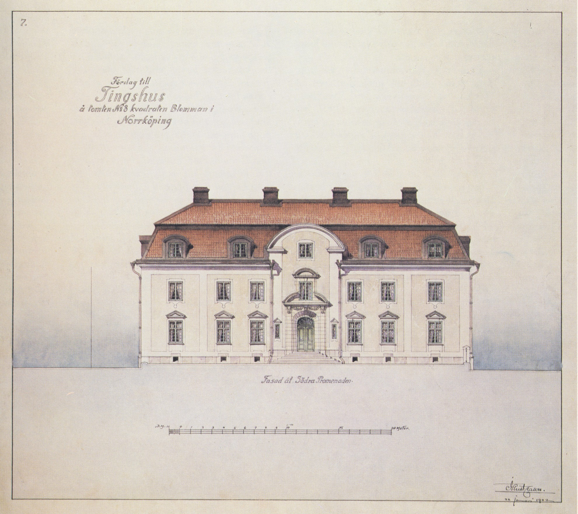 Originalskiss till Tingshuset i Norrköping